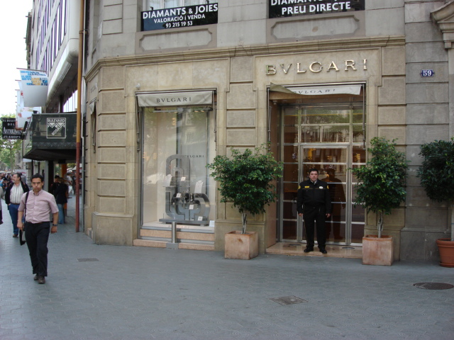 Bulgari Store in Barcelona, Spain